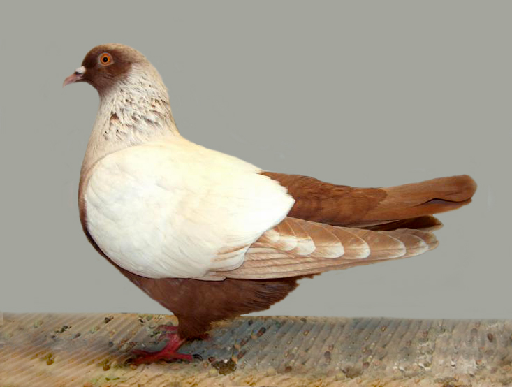 Danish Suabien (Red - Rodsvaber)